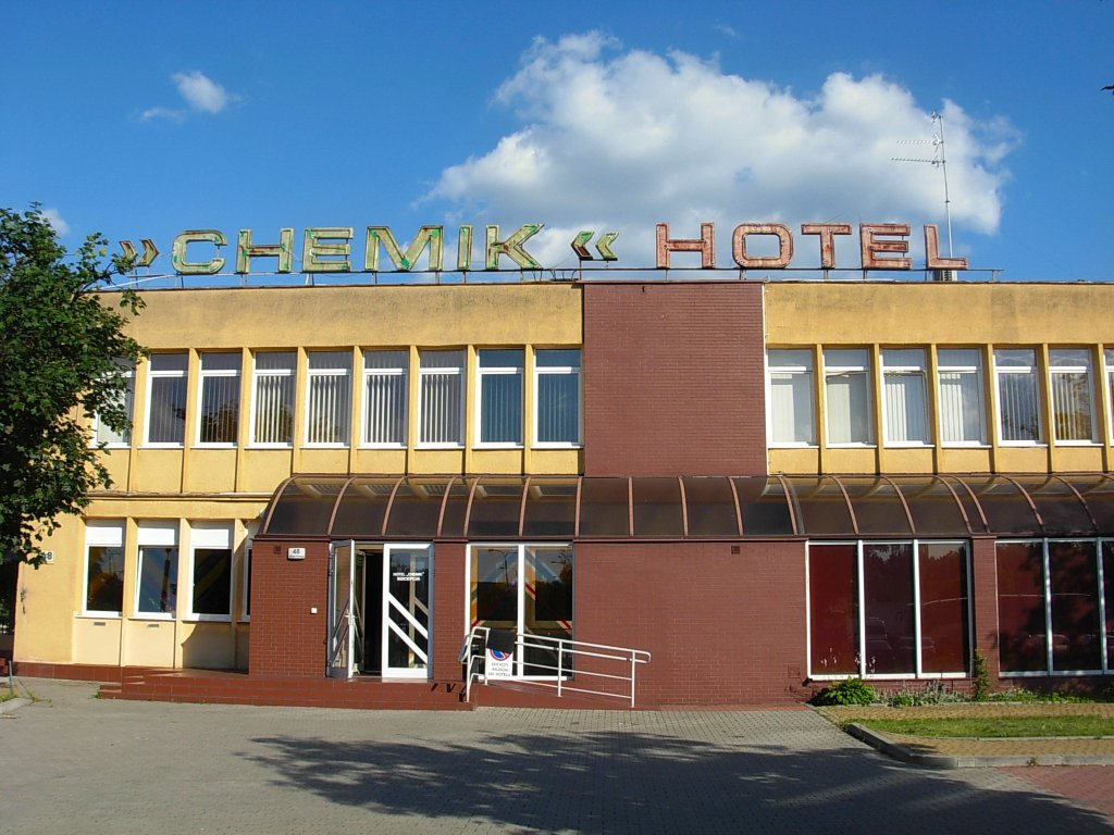 Hotel Chemik w Bydgoszczy, ul. Wojska Polskiego 48